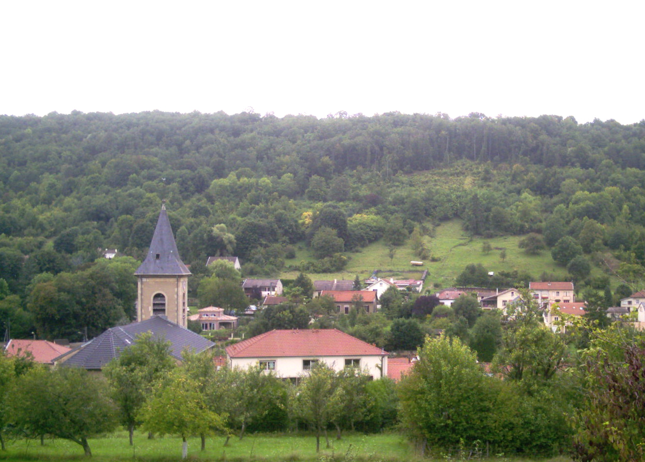 Arret SNCF de Pompey